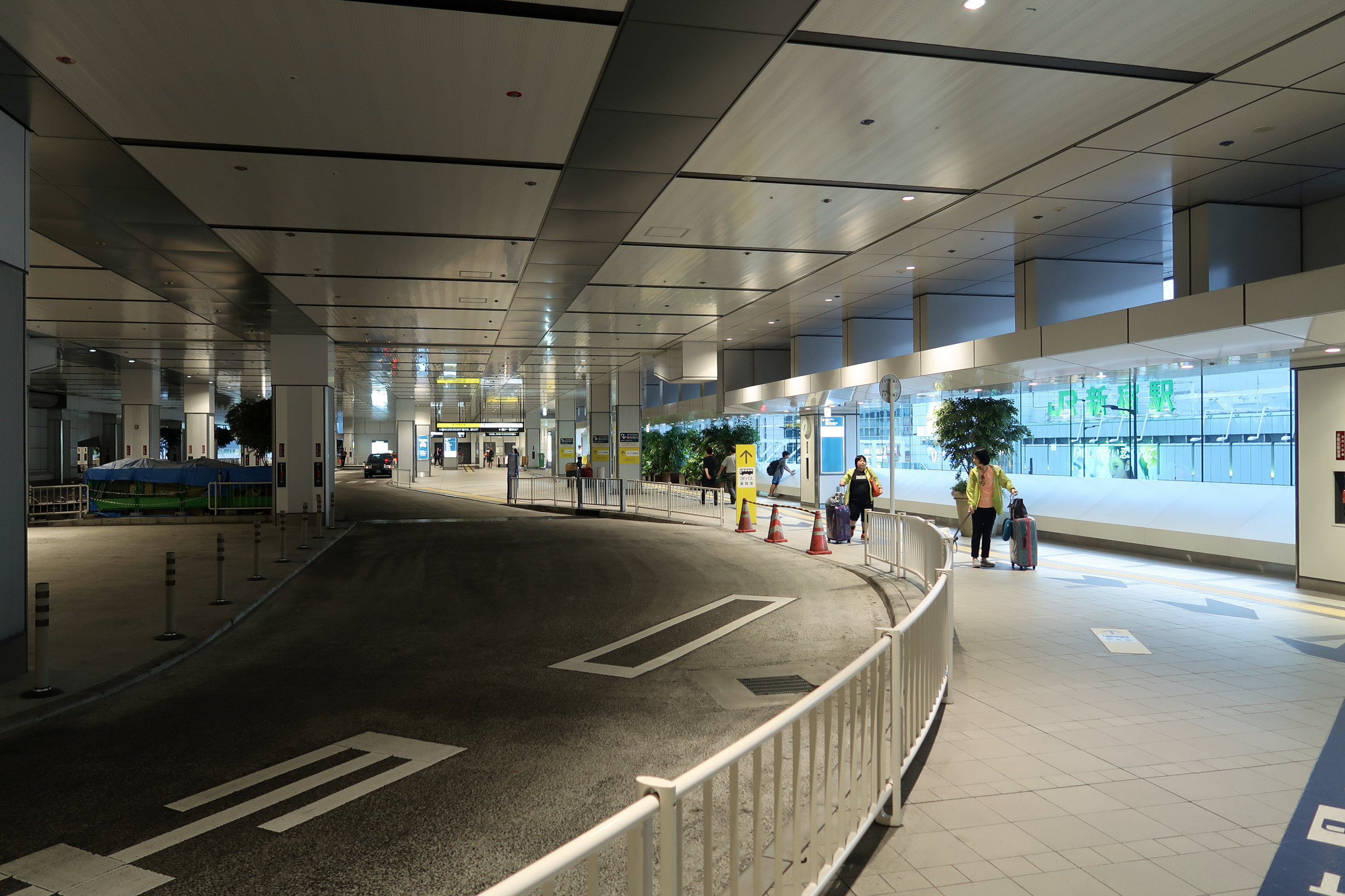 Shinjuku Express Bus Terminal